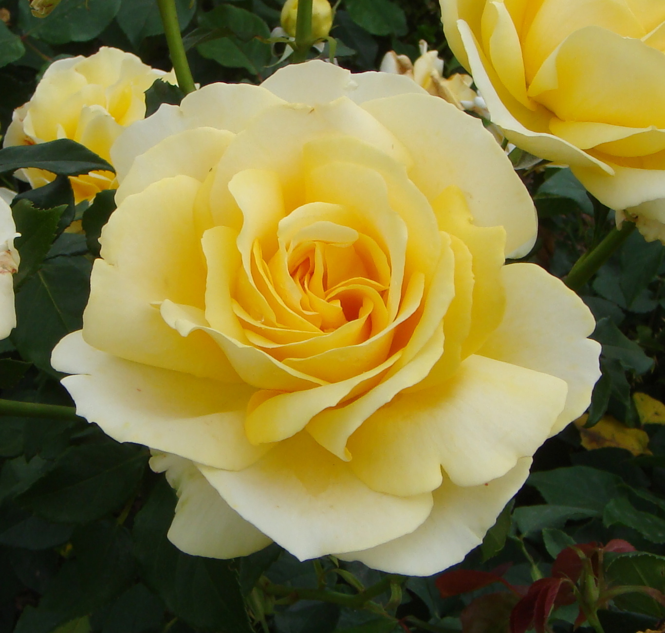 At the University Gardens in Frederiksberg - Landbohøjskolens Have.